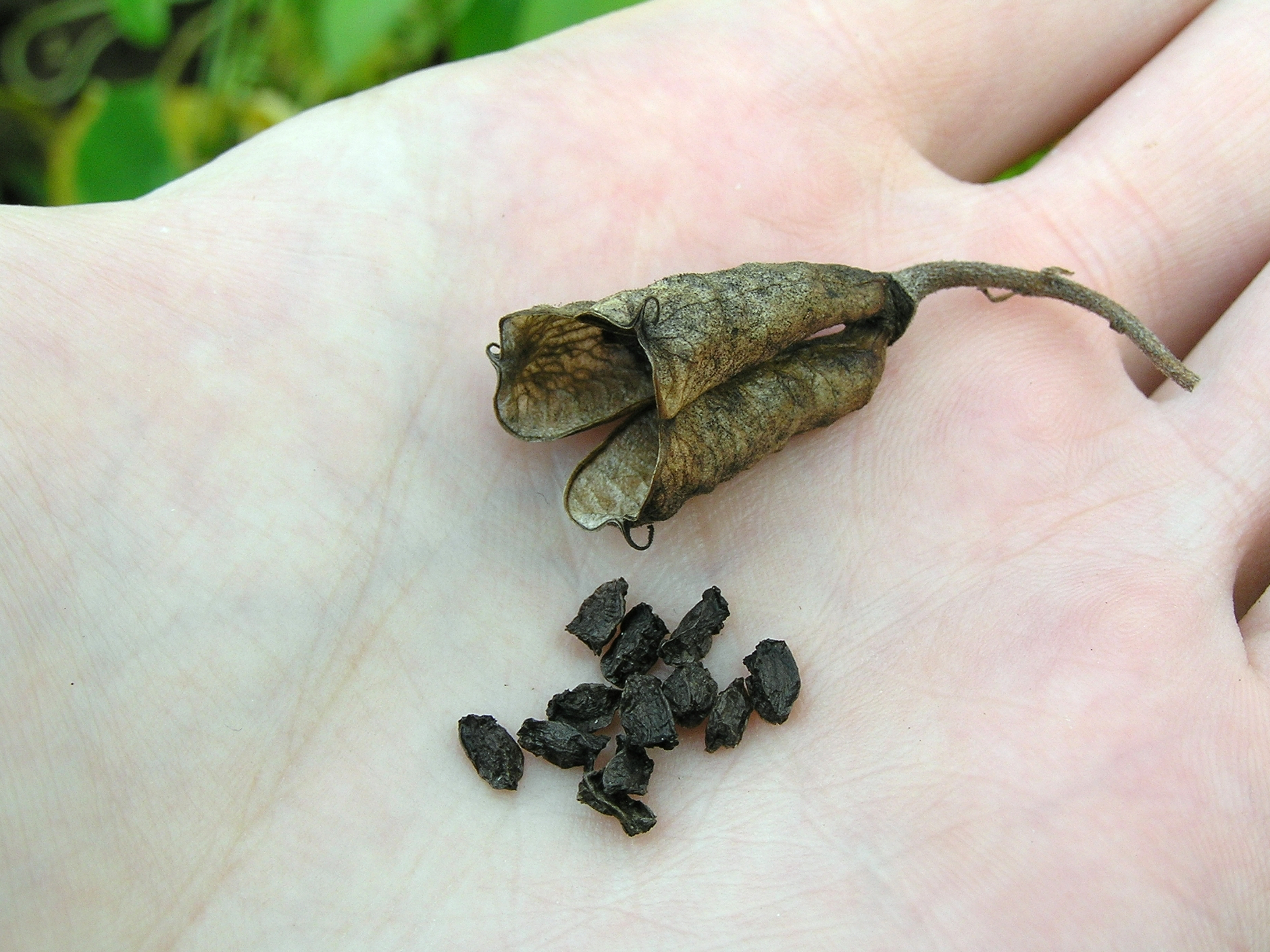 Sinise käokinga vili ja seemned peopesal.